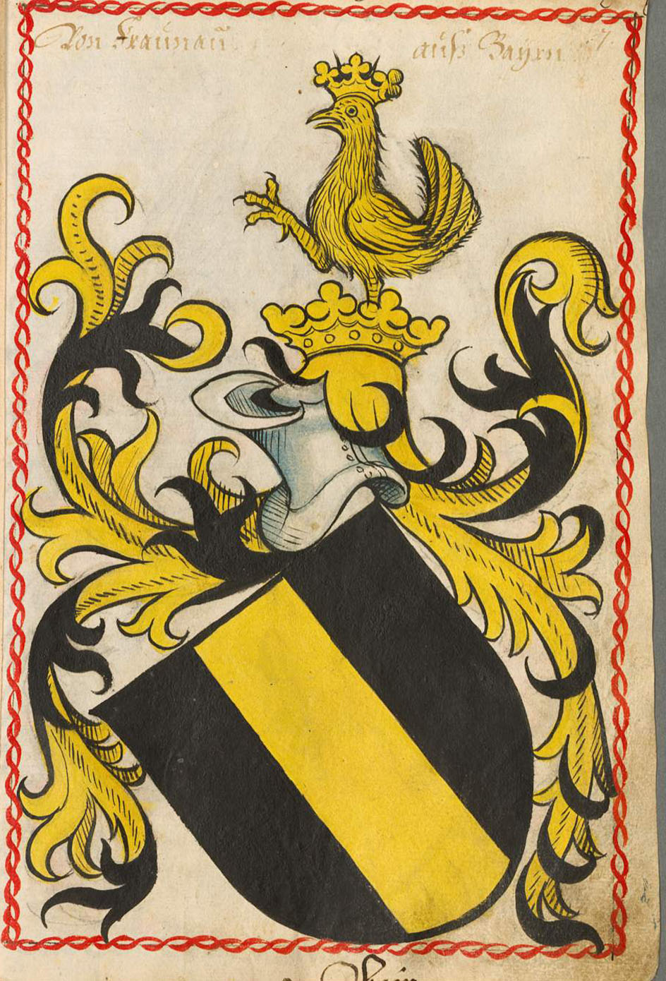 Scheibler'sches Wappenbuch , älterer Teil; Seite 7 Von Fraunau auß Bayrn